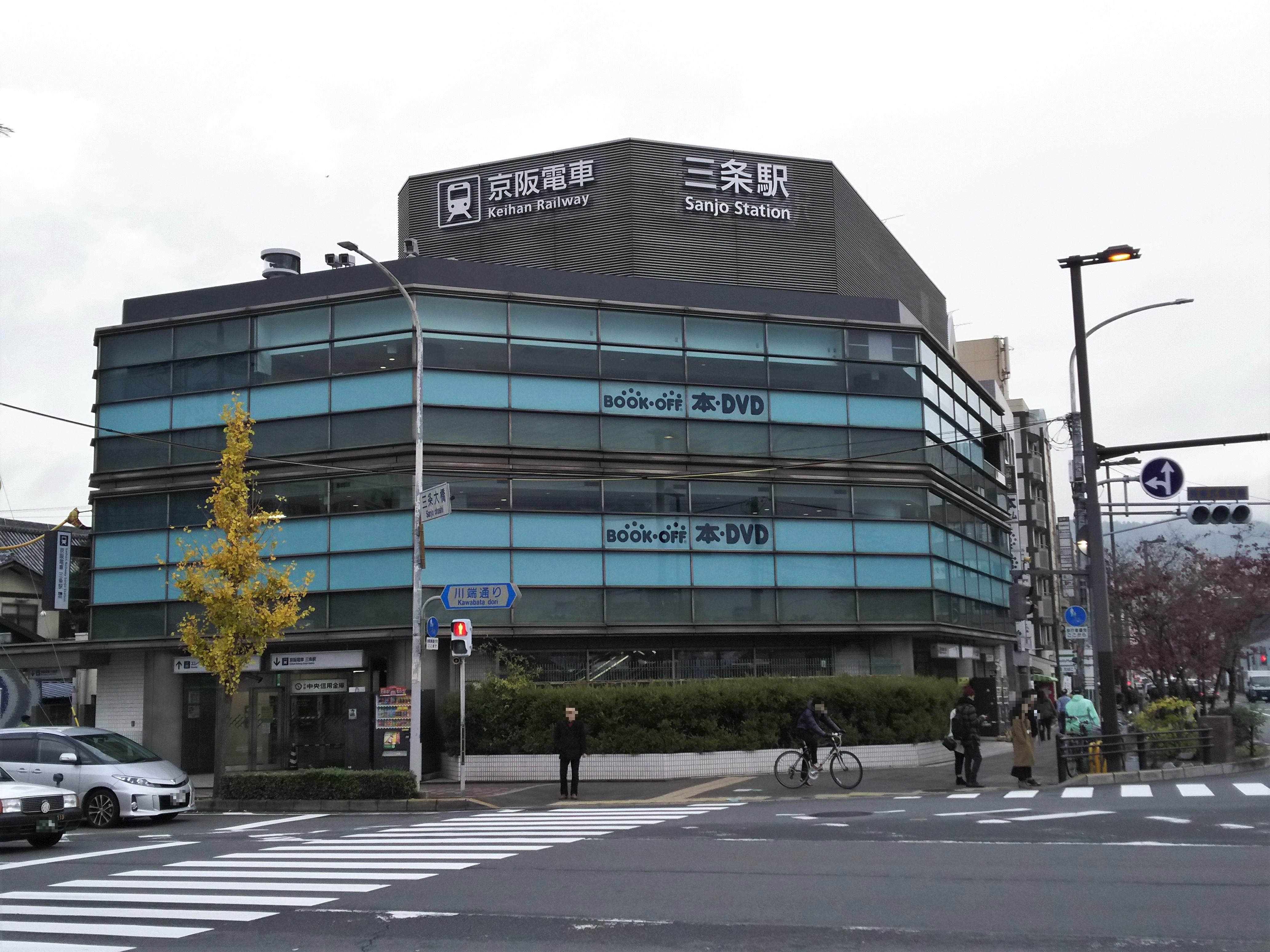 京阪本線三条駅北ビル（京都市東山区）